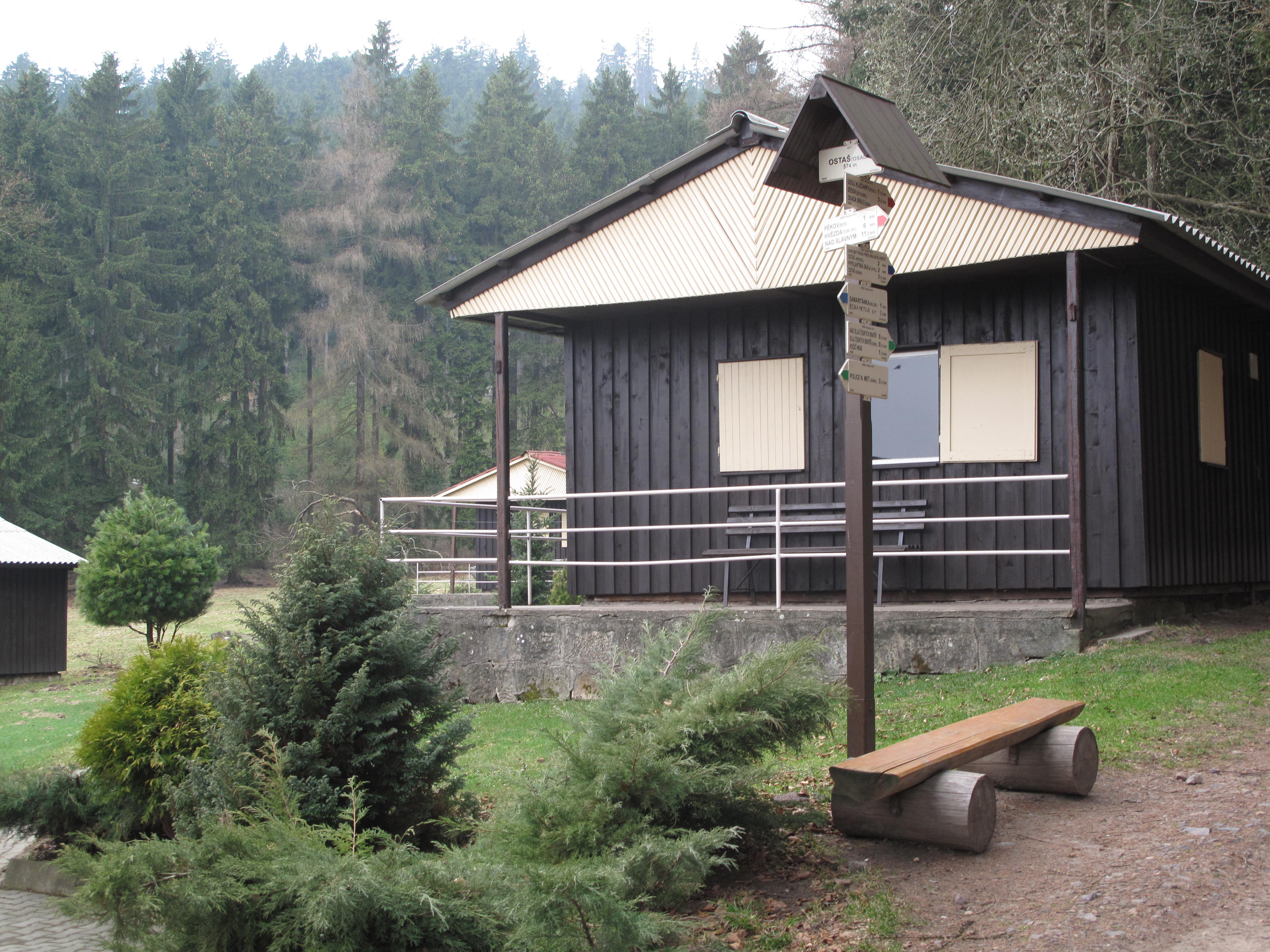 Česky: Ostaš, osada